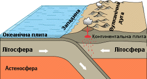 Активна континентальна окраїна. Переклад